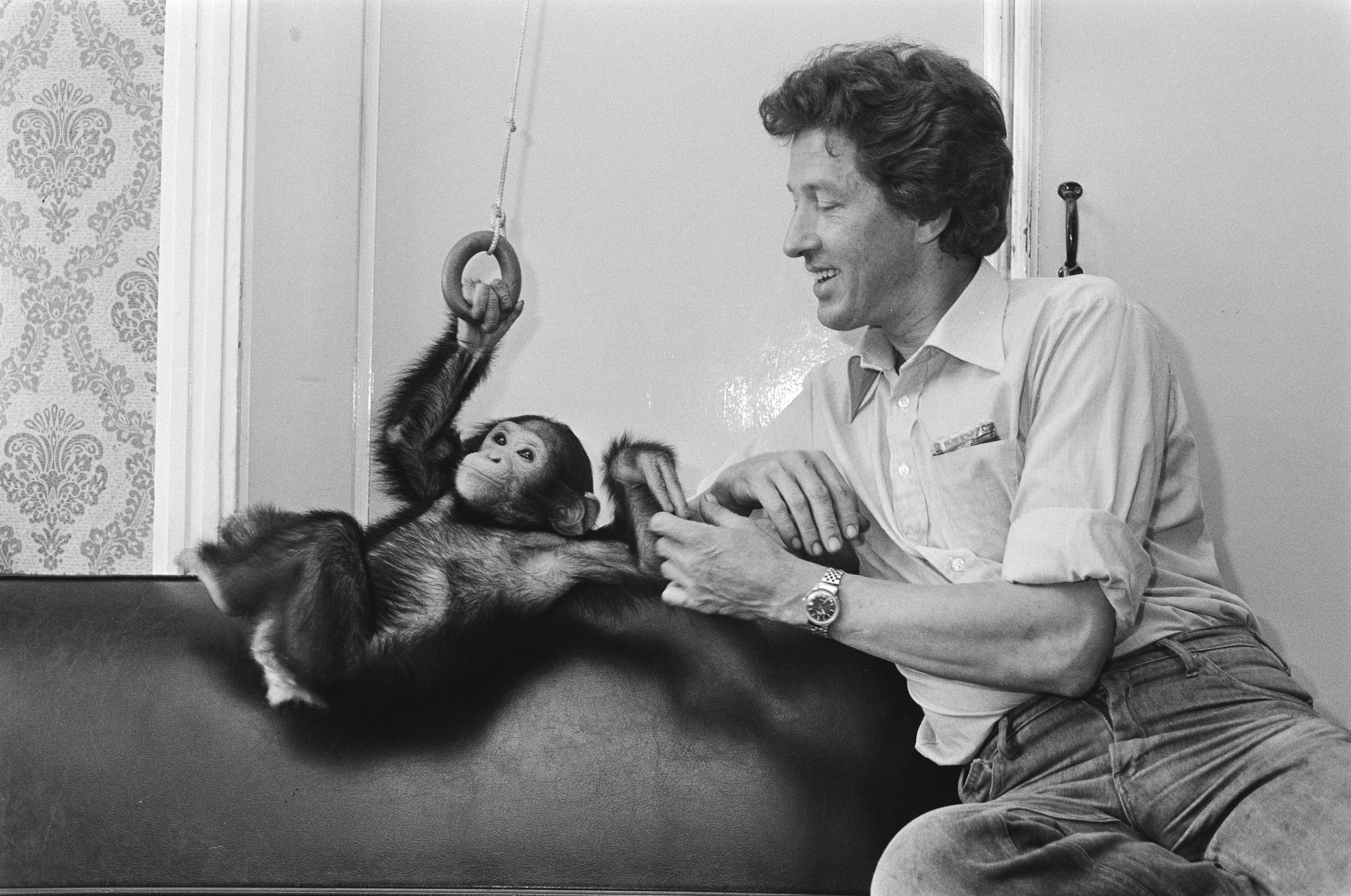 Collectie / Archief : Fotocollectie Anefo Reportage / Serie : [ onbekend ] Beschrijving : 1,5 jaar oud chimpansee Sita emigreert naar Afrika, omdat Nederland geen apen mogen worden gehouden; Dick Venema speelt met het aapje Datum : 14 juli 1981 Locatie : Afrika Trefwoorden : APEN, emigratie Persoonsnaam : Chimpansee Fotograaf : Antonisse, Marcel / Anefo Auteursrechthebbende : Nationaal Archief Materiaalsoort : Negatief (zwart/wit) Nummer archiefinventaris : bekijk toegang 2.24.01.05 Bestanddeelnummer : 931-5895